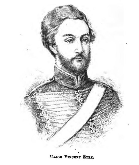 Vincent Eyre (1811–1881)